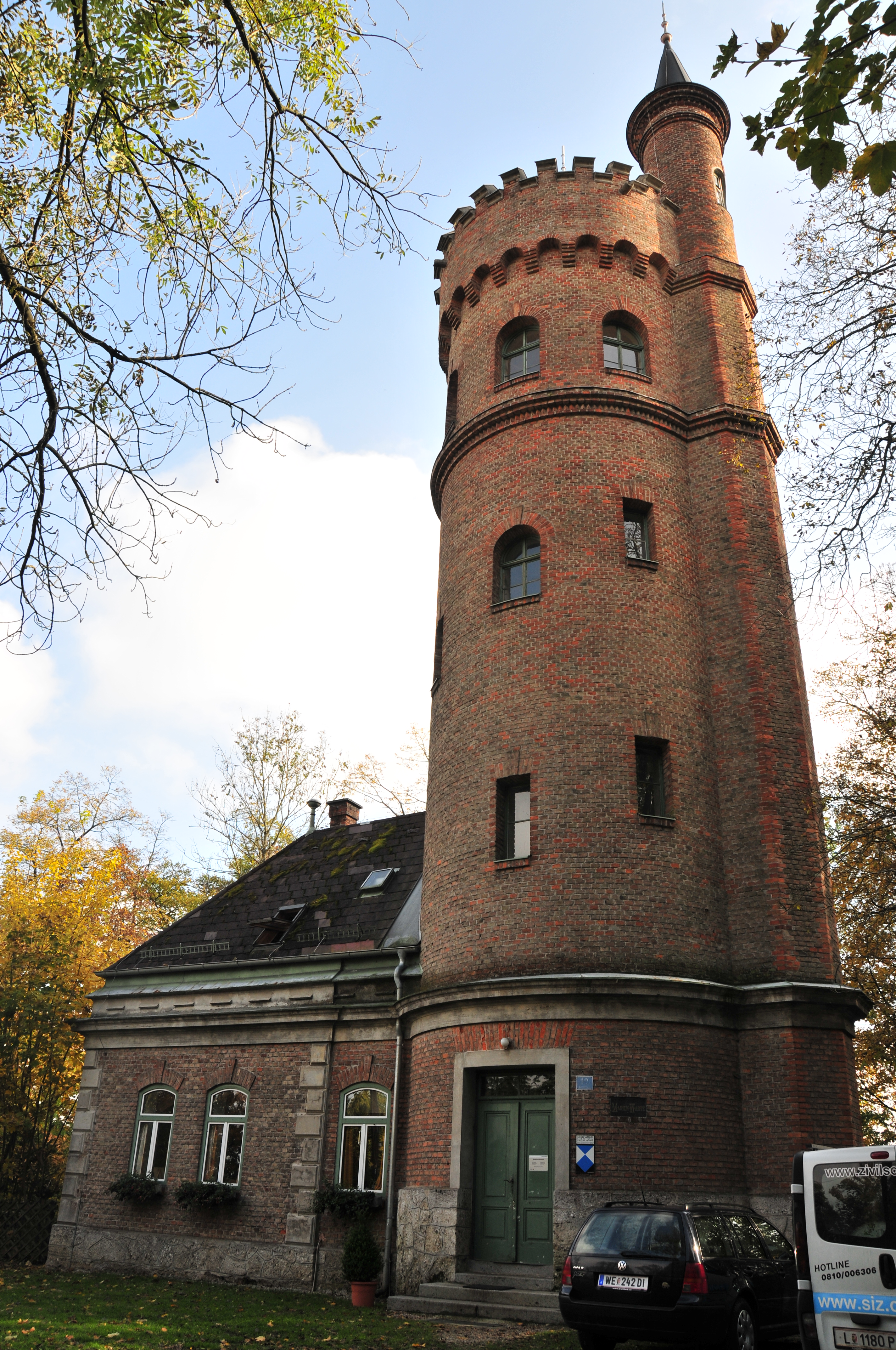 Marienwarte mit Eingangspavillon